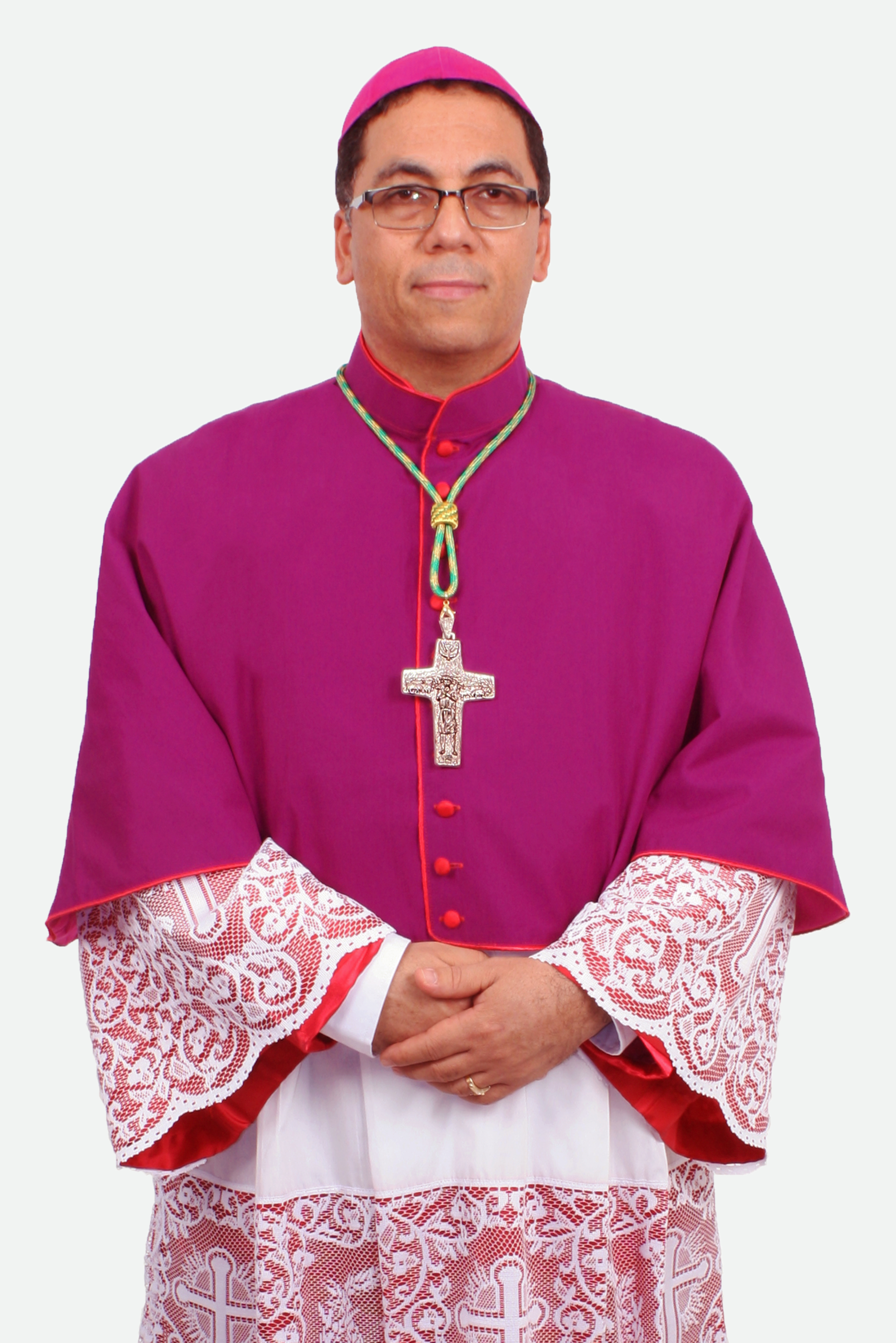 Mons. Santiago Rodriguez, obispo de San Pedro de Macorís.